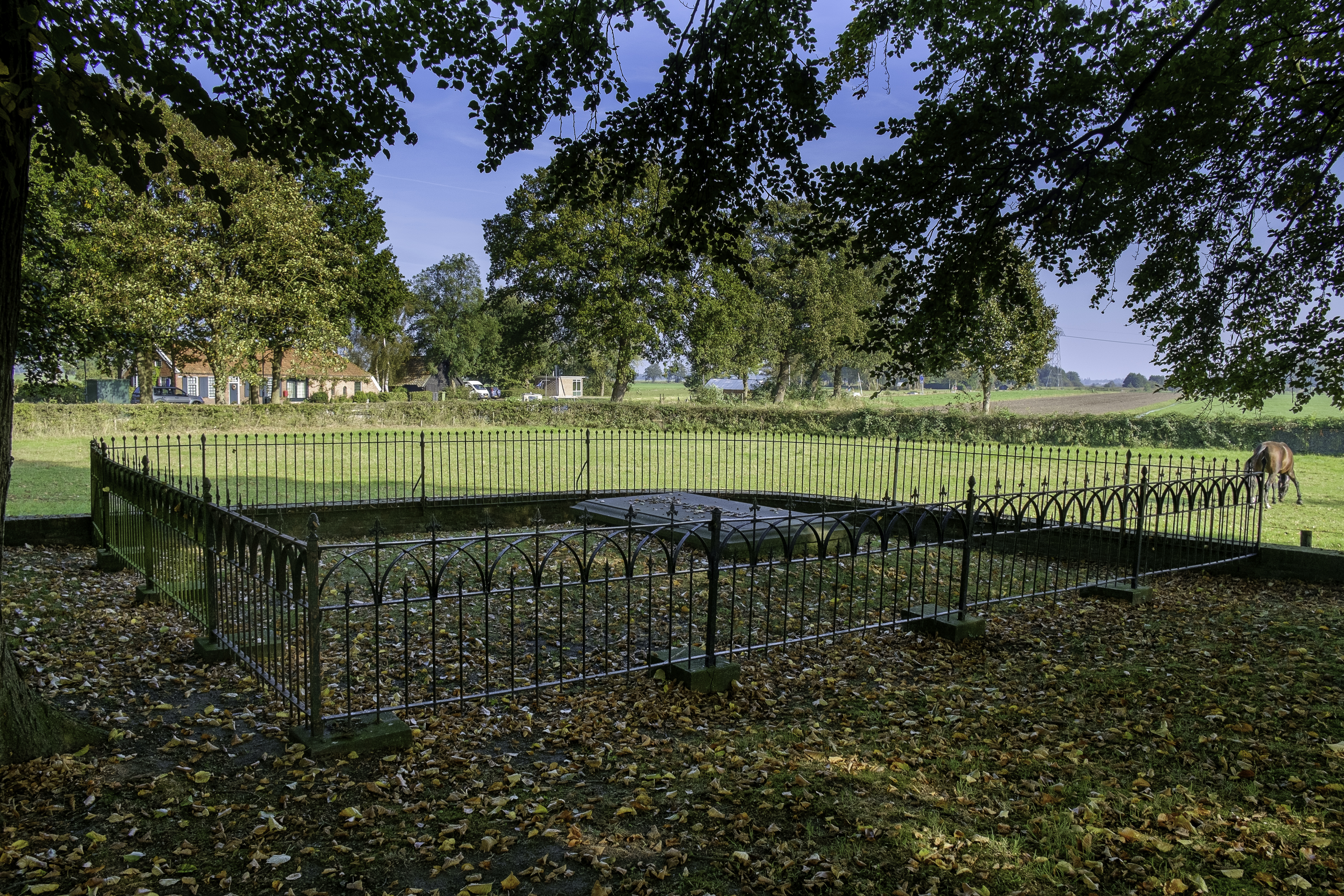 Familiegraf Van Swinderen op het kerkhof van Noordlaren